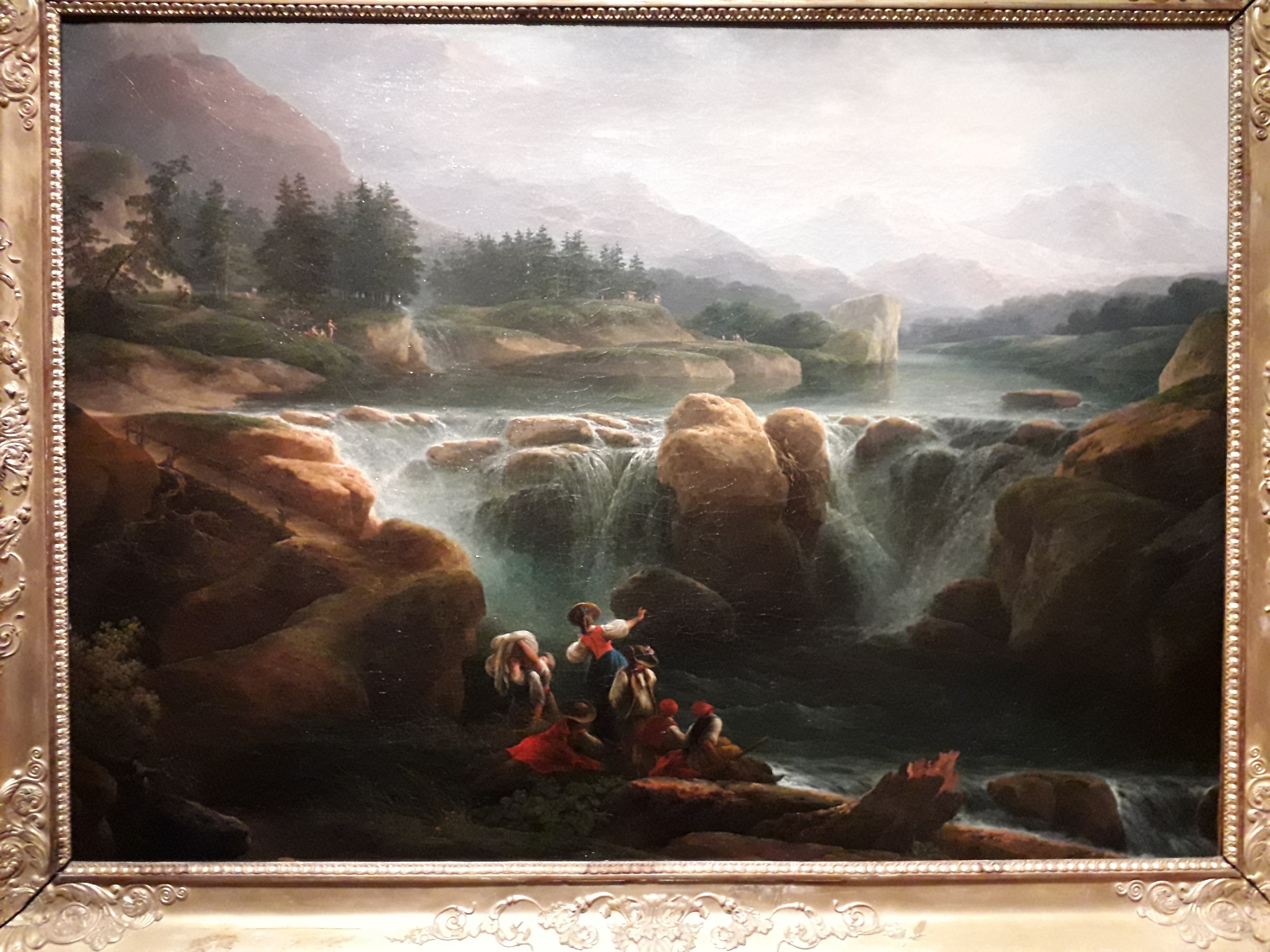 tableau de Claude Louis Châtelet, musée des beaux-arts d'Orléans